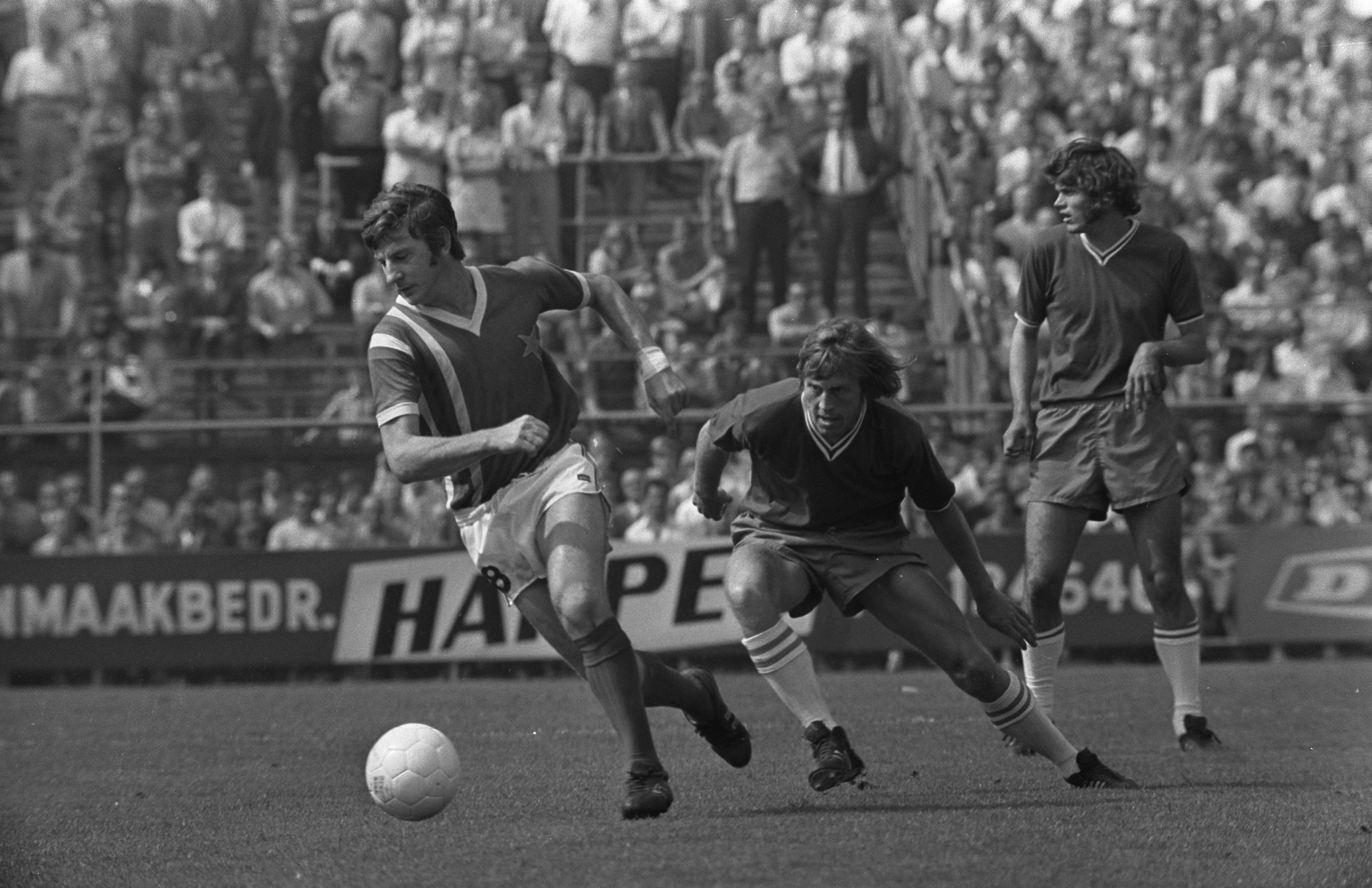 Collectie / Archief : Fotocollectie Anefo Reportage / Serie : [ onbekend ] Beschrijving : Ajax tegen MVV 2-0; v.l.n.r. Ko Prins , Nico Rijnders (midden) in aktie Datum : 30 augustus 1970 Trefwoorden : sport, voetbal Persoonsnaam : Ko prins, Rijnders, Nico Fotograaf : Koch, Eric / Anefo Auteursrechthebbende : Nationaal Archief Materiaalsoort : Negatief (zwart/wit) Nummer archiefinventaris : bekijk toegang 2.24.01.05 Bestanddeelnummer : 923-7941